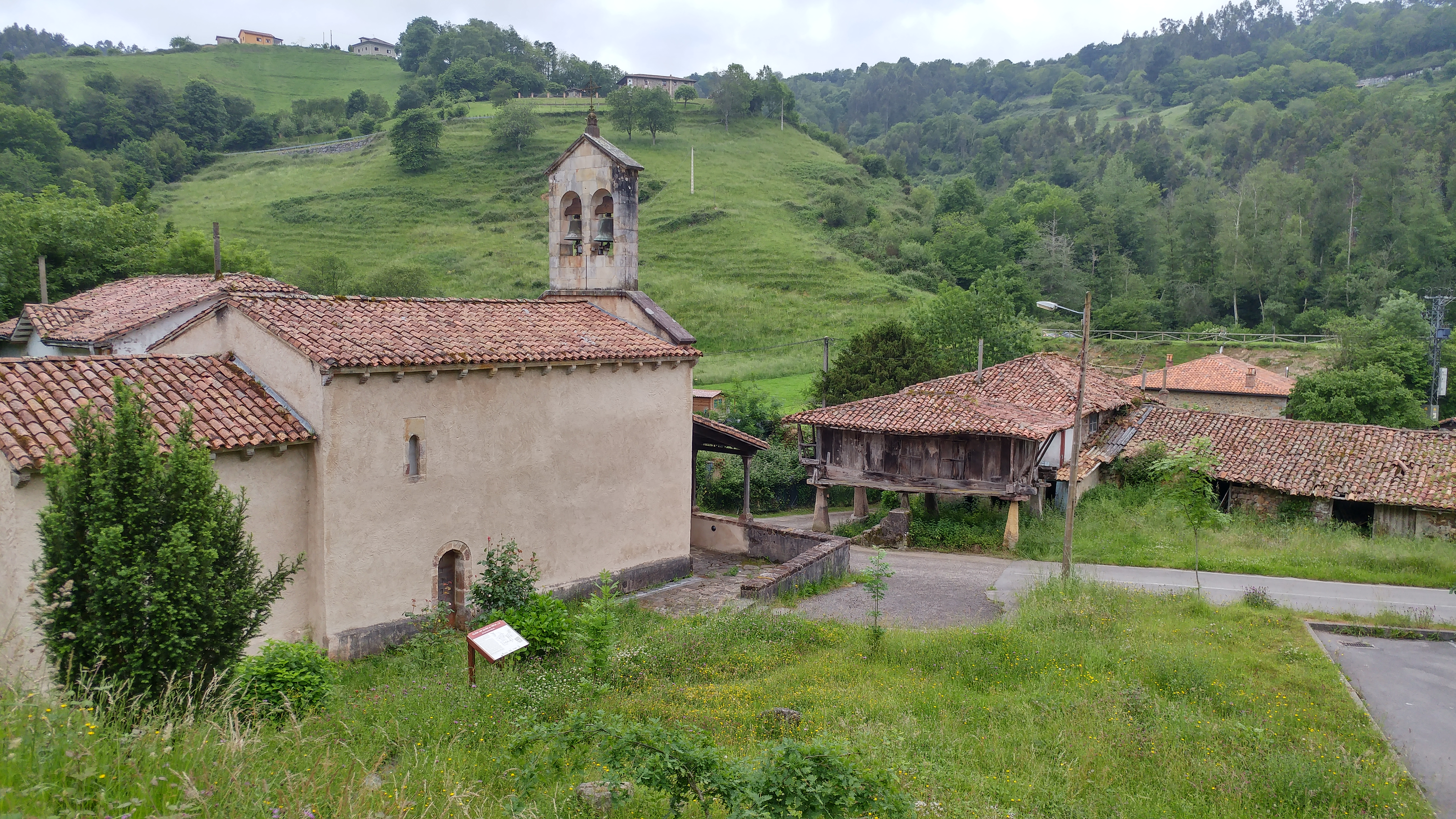 Iglesia de San Julían de Viñón